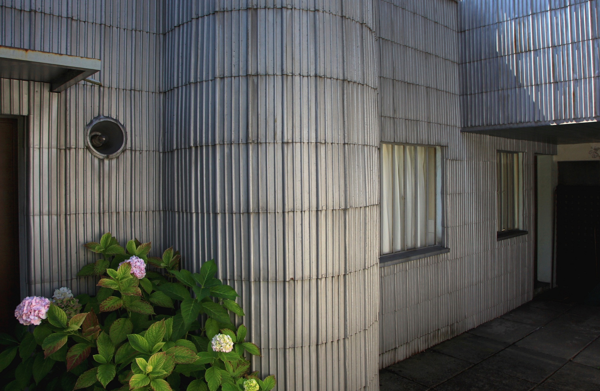 Corseaux